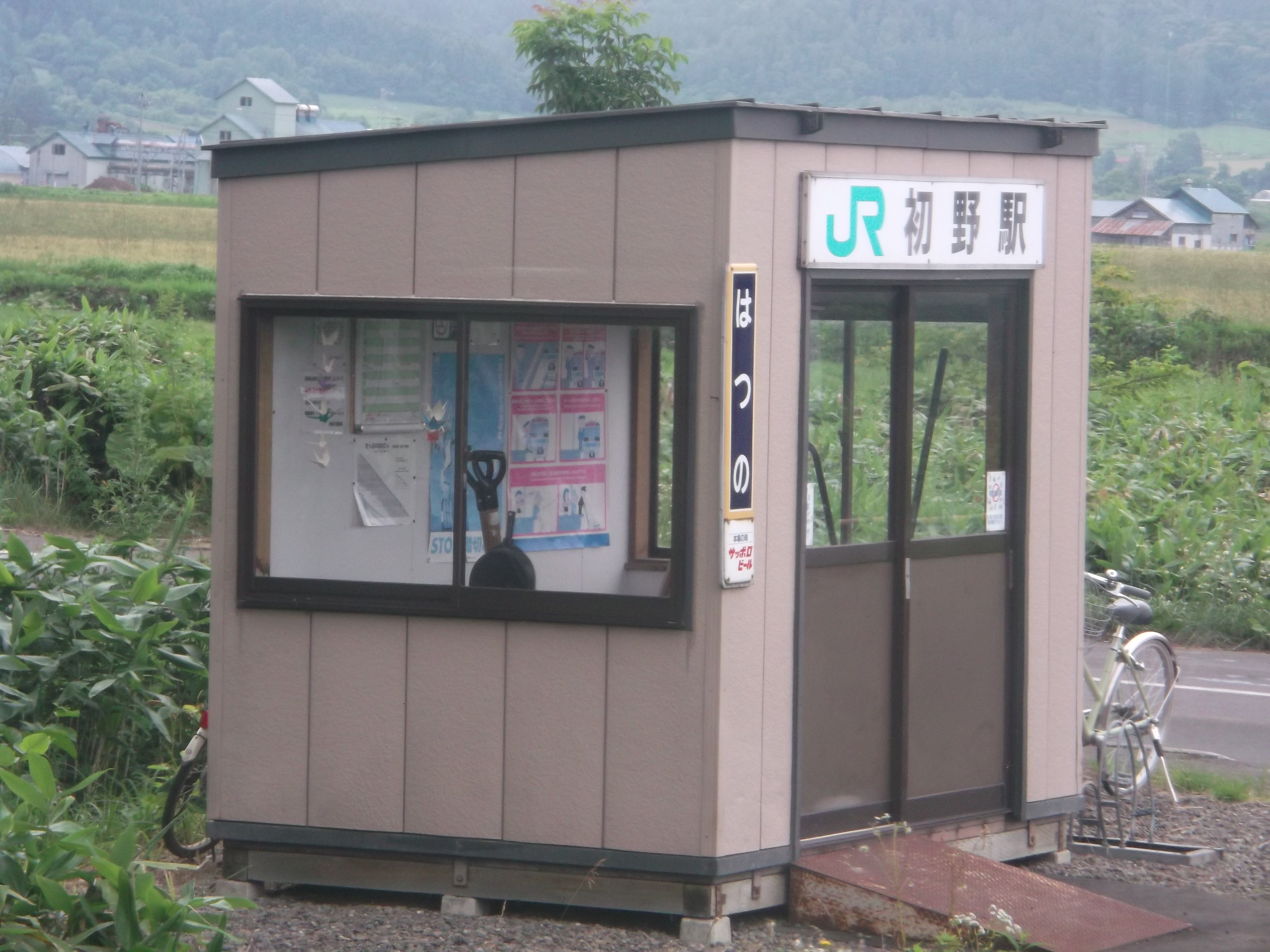 JR北海道宗谷本線初野駅 待合室